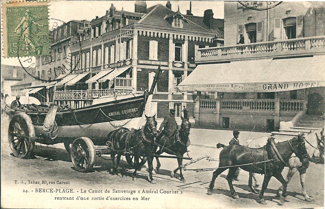 Berck-Plage - Le canot de sauvetage "Amiral Courbet" rentrant d'une sortie d’exercice en mer - avant 1922